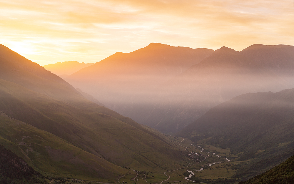 Национальный парк Алания, Ирафский район This image is related to the protected area of Russia number 1500198